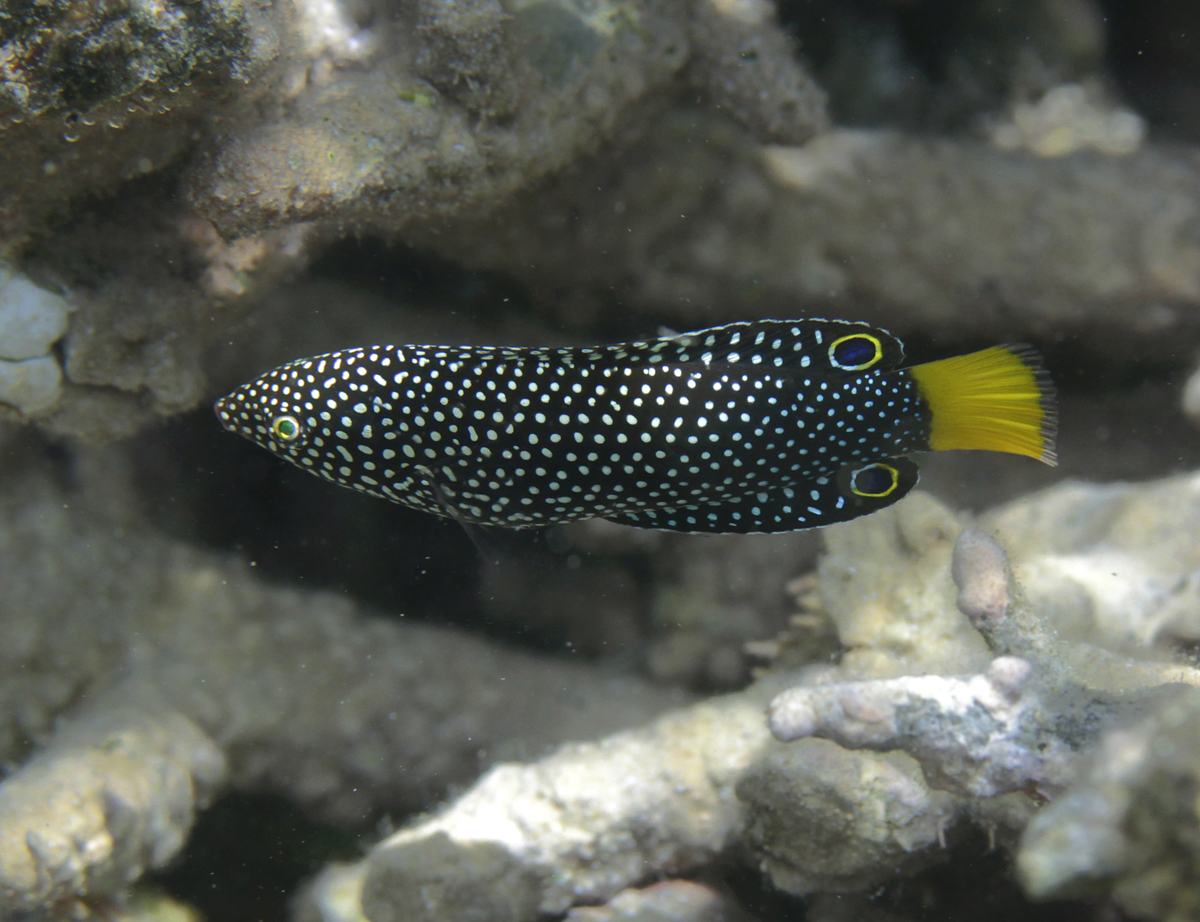 Un labre à queue jaune (Anampses meleagrides) juvénile à la Réunion.